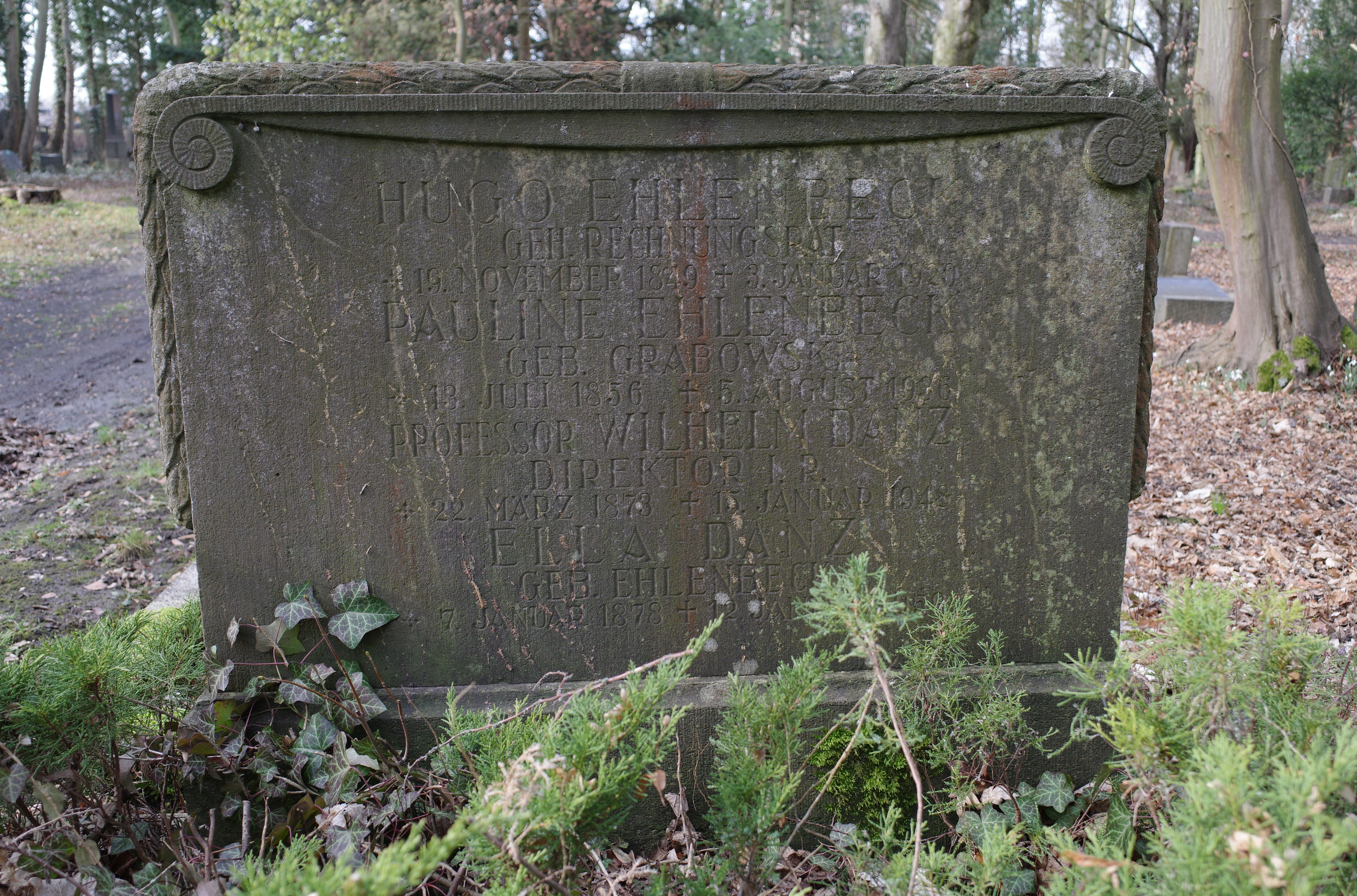 Dessau, Friedhof 3. Ruhestätte von Professor Wilhelm Danz.